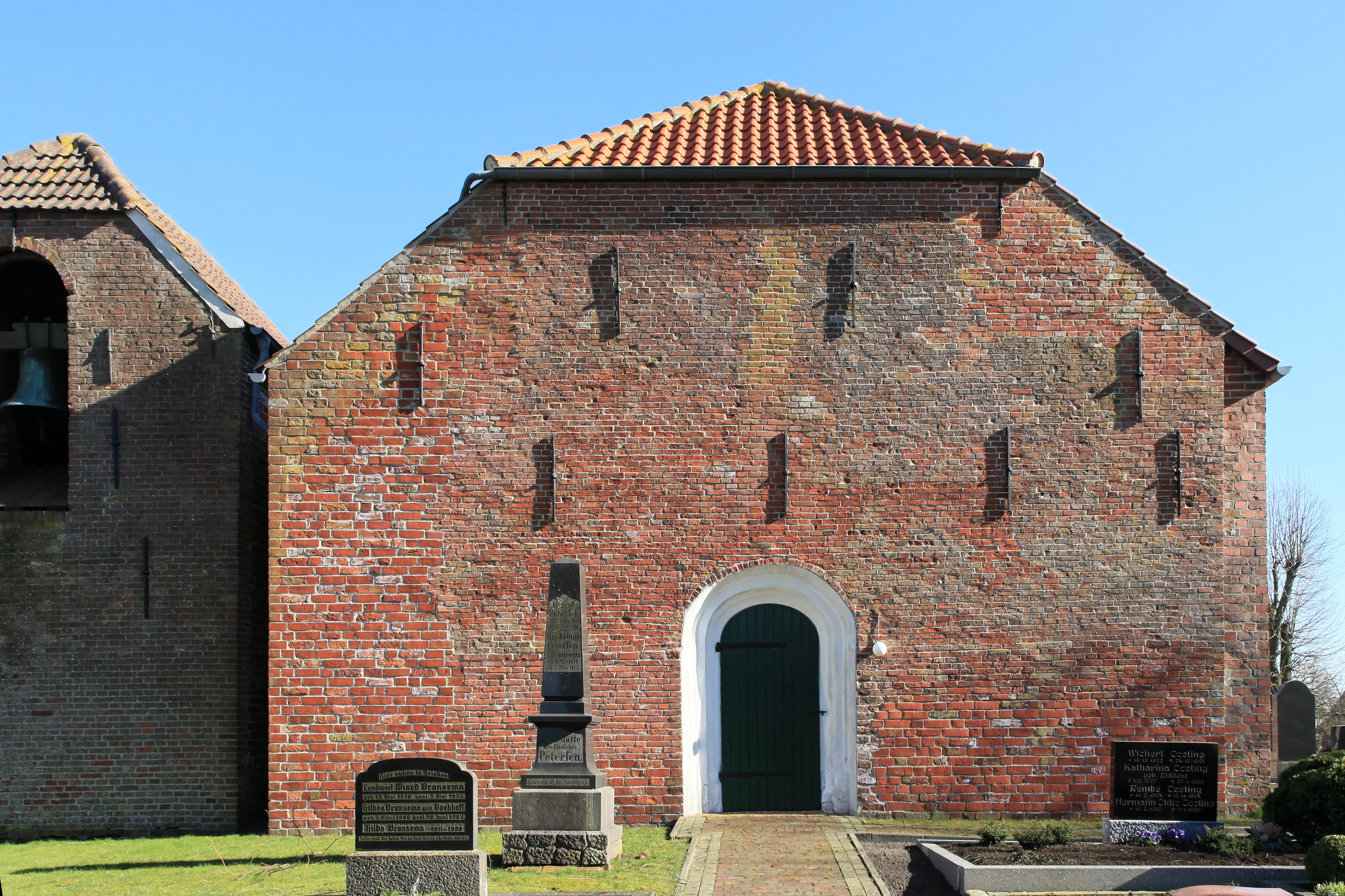 Friedhof, Kirche und Glockenturm, Turmweg in Oldendorp, Jemgum